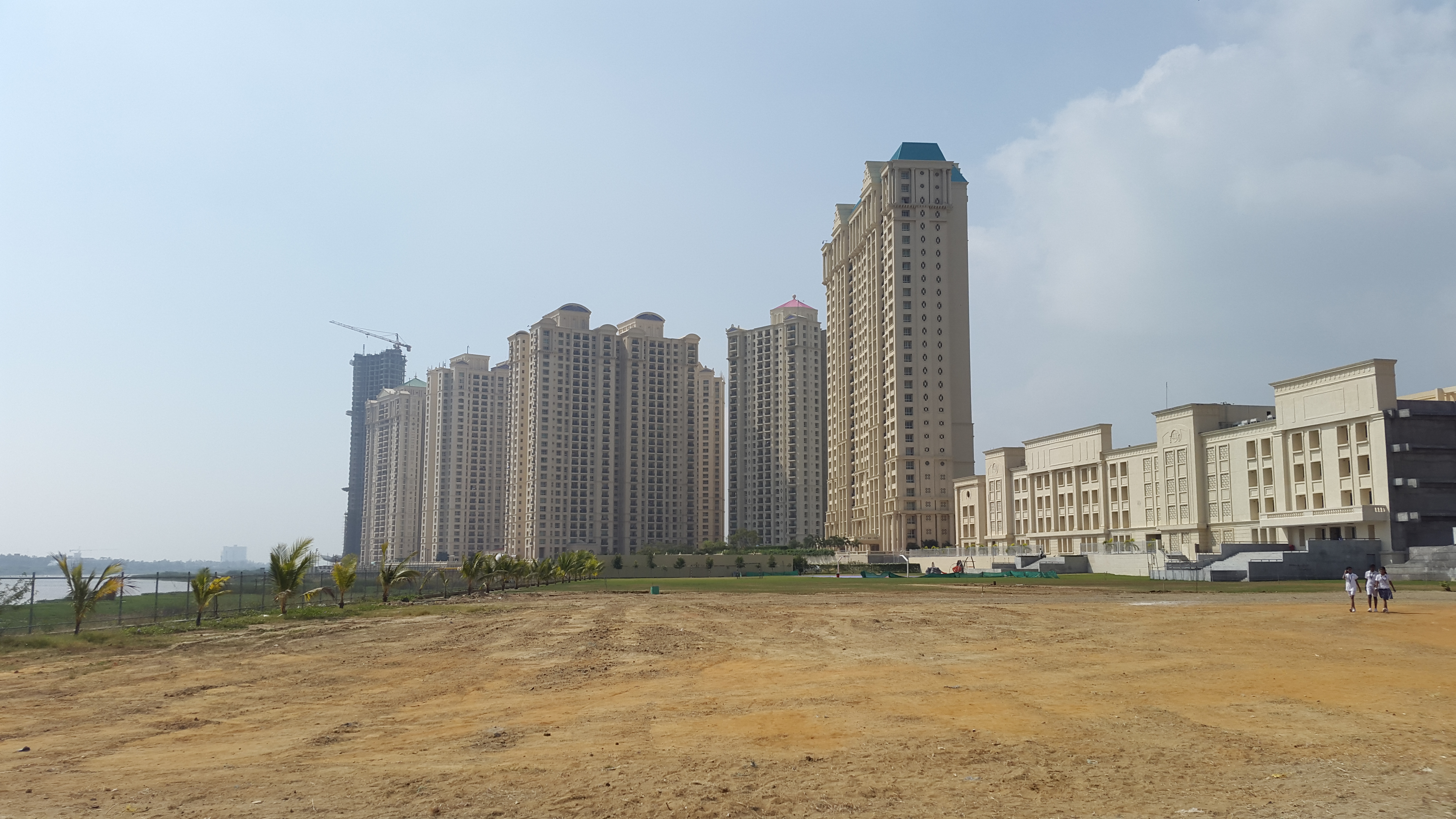 Hira view